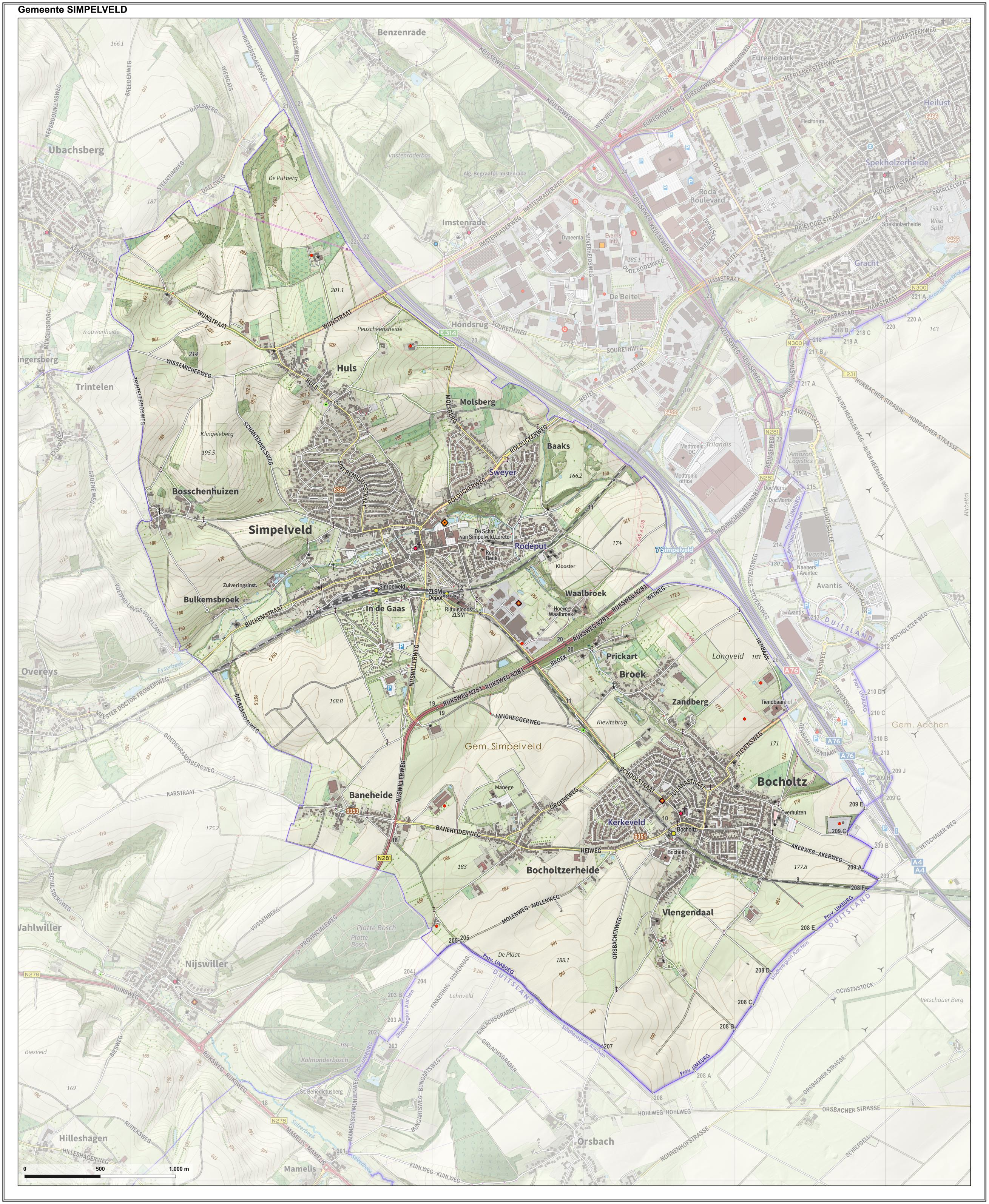 Topografische gemeentekaart. Resolutie: 400 pixels/km. Kaartbeeld samengesteld uit de open geodata van de Top10NL en Top25namen (Kadaster), Creative Commons-BY licentie. Gebouwvlakken uit open geodata BAG extract. Wegen uit de OpenStreetMap, OpenStreetMap community. Reliëfschaduw uit de Actuele Hoogtekaart AHN2. Samenstelling en kleurenschema: Jan-Willem van Aalst, met QGIS. Zie ook de Legenda.